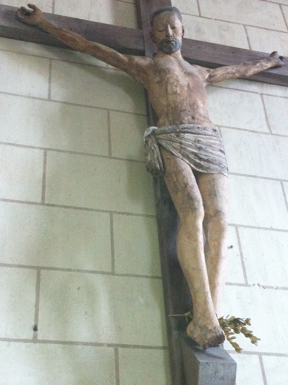 Christ lépreux de l'église de Cheillé, en Indre-et-Loire (sculpture classée, œuvre d'un sculpteur anonyme lépreux, XVIe siècle).